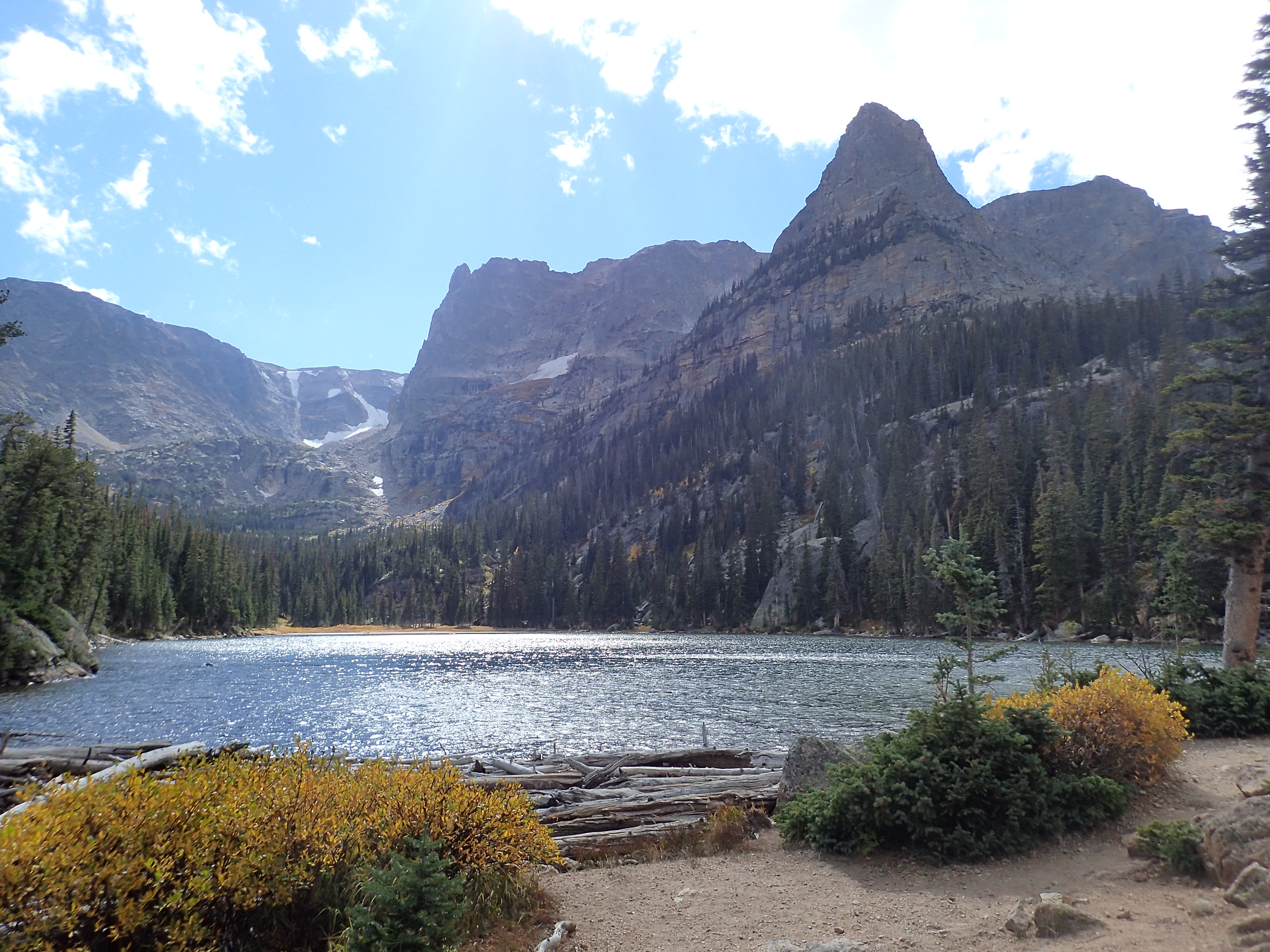 Odessa Lake